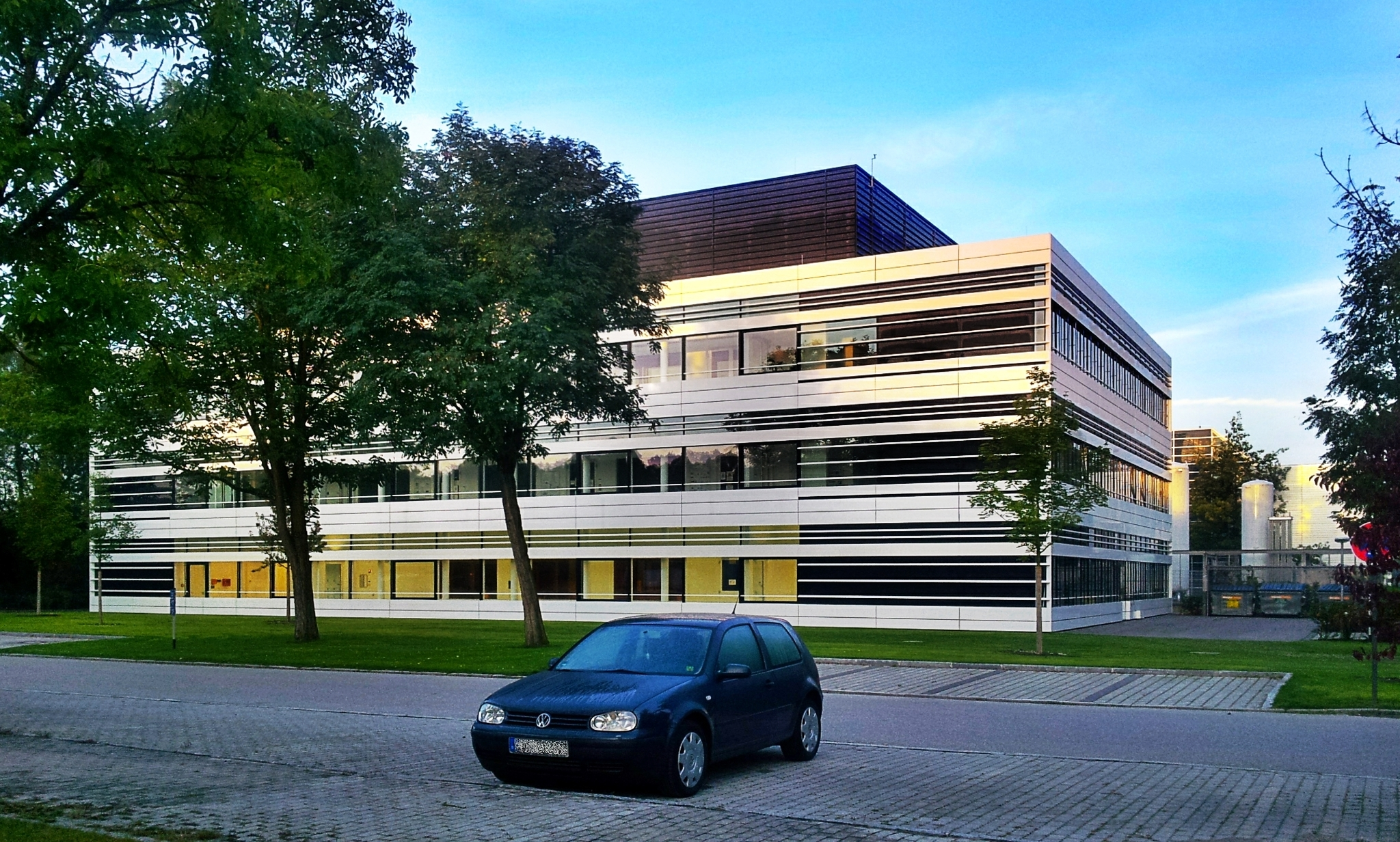 Center for Nanotechnology and Nanoscience des Walter Schottky Instituts in Garching